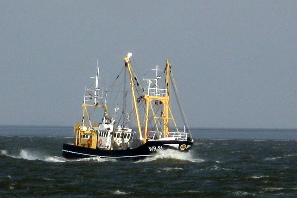 Niederländischer Trawler im Süderpiep-Priel vor Büsum im Schleswig-Holsteinisches Wattenmeer